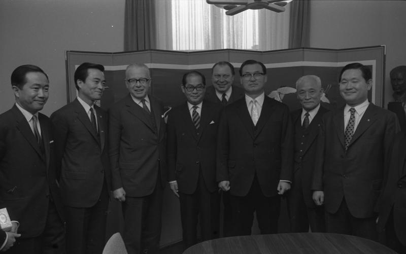 Buprä Heinemann empfängt eine Parlamentsdelegation aus Südkorea Bonn